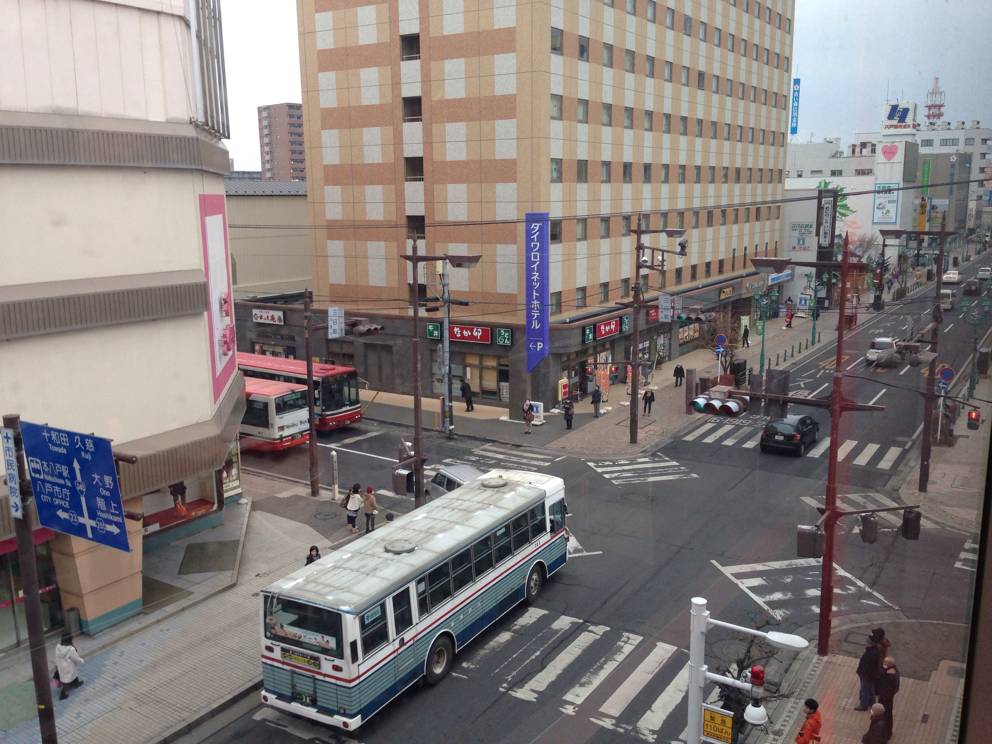 八戸市三日町スクランブル交差点